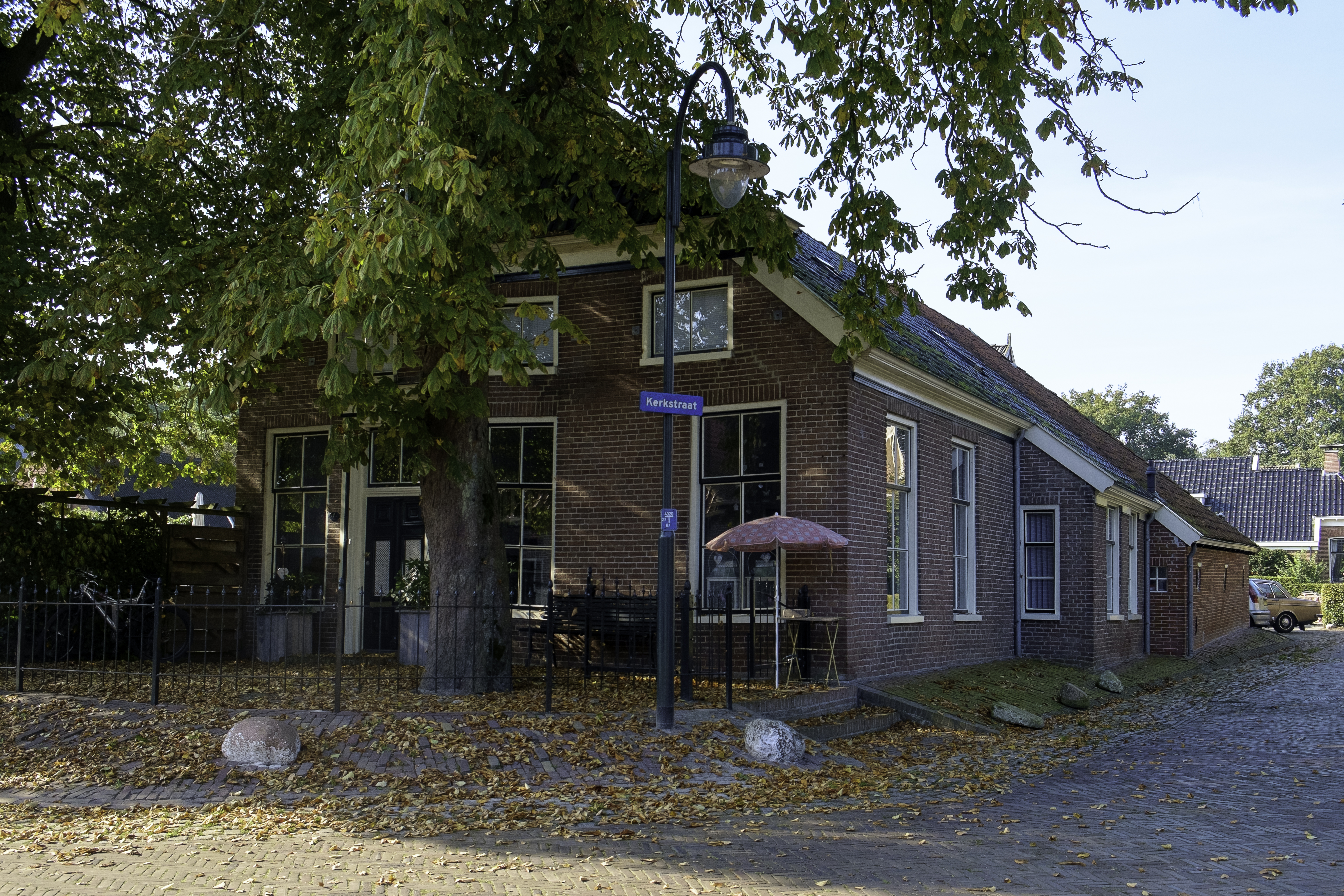 Middenstraat 1 in Noordlaren